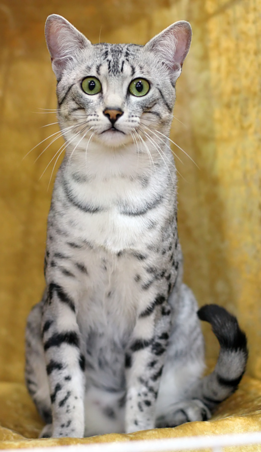 Mau égyptien Black smoke présenté au ERY-SYD cat show à Hyvinkää en Suède en 2008. CH Chai-lai Lisimba (Simba) [MAU ns 24] male EX1 CAP